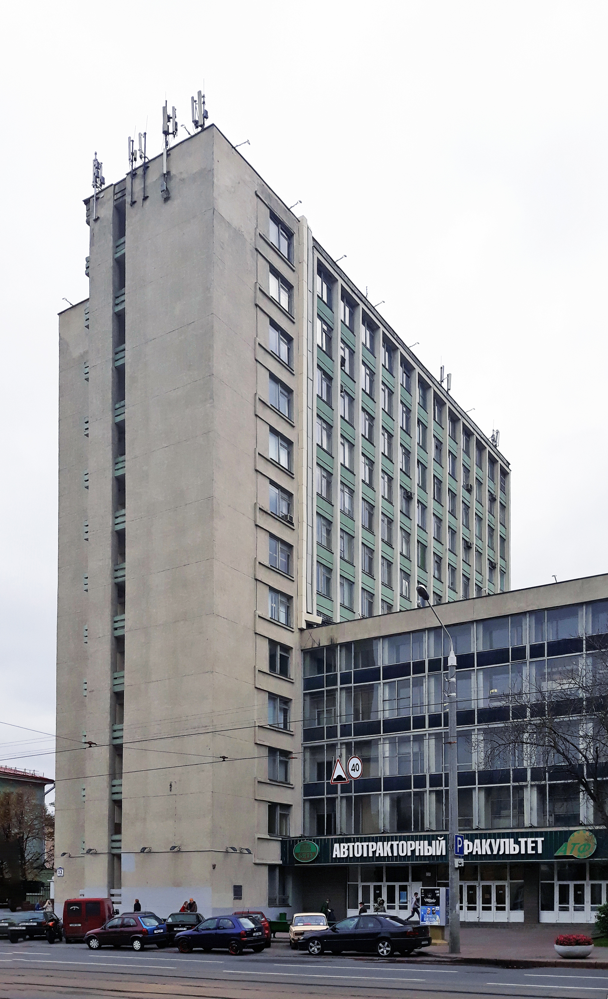 БНТУ